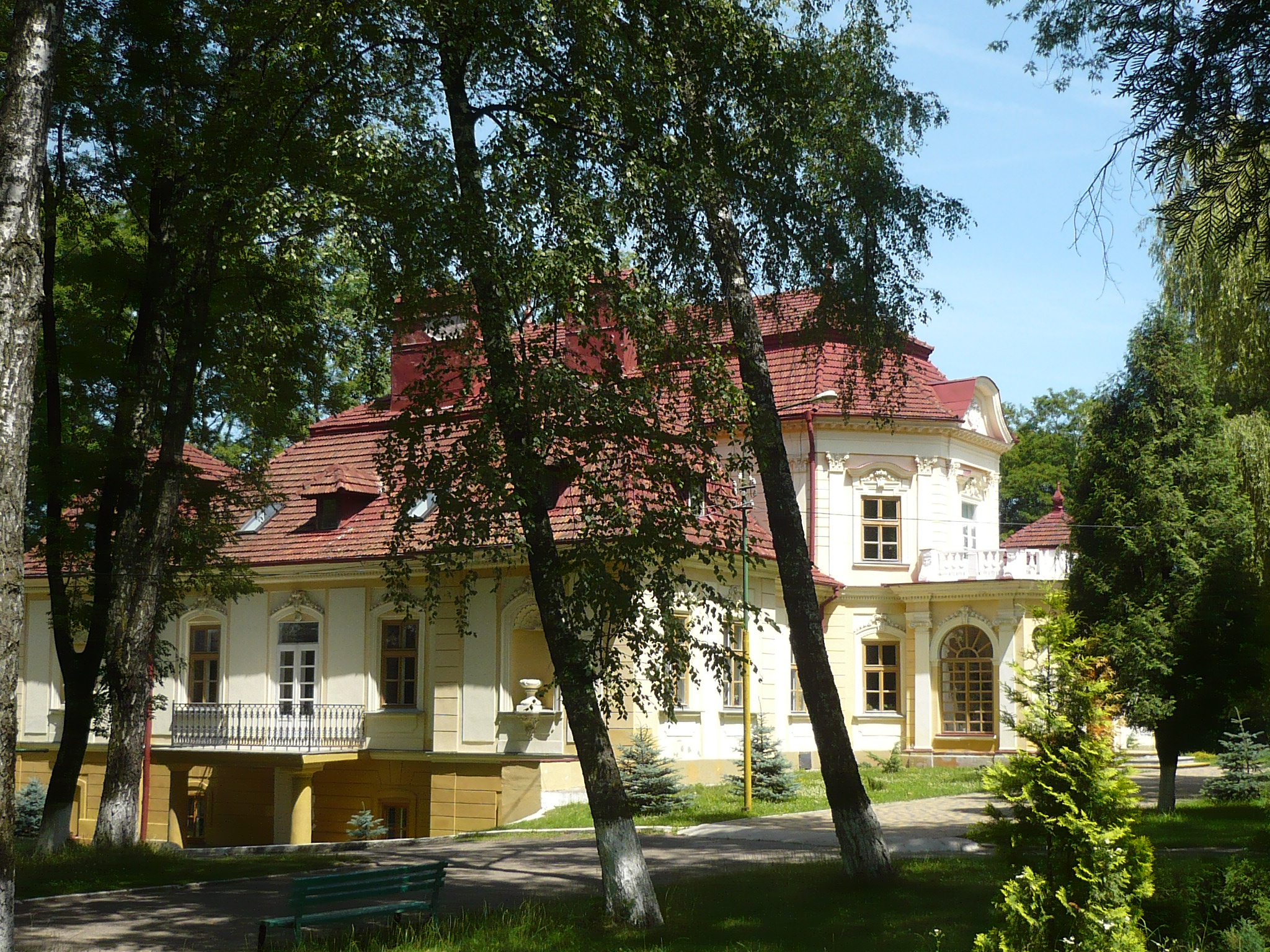 Pałac. Lubień Wielki